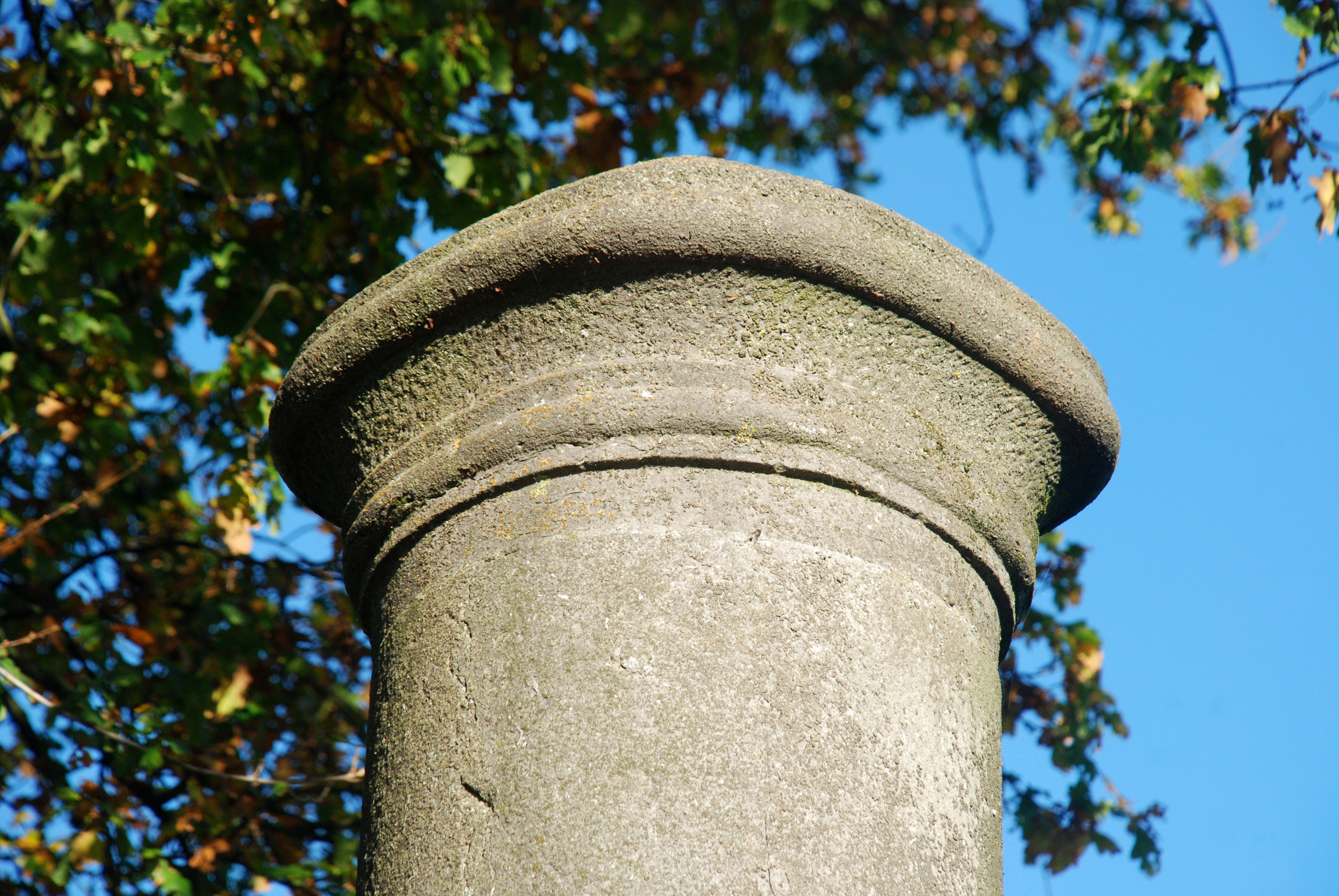 Belgique - Brabant wallon - Lasne - Monument au comte von Schwerin (bataille de Waterloo)